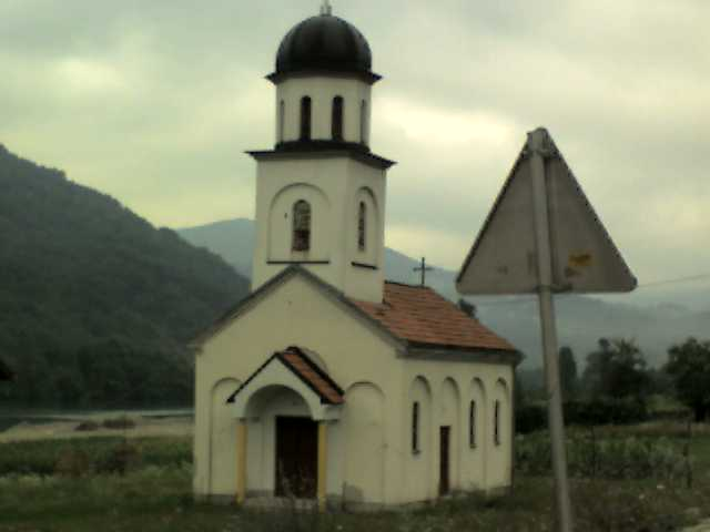 Аутор, МарканСК, сликано у Полому! Авуст 2006 године!